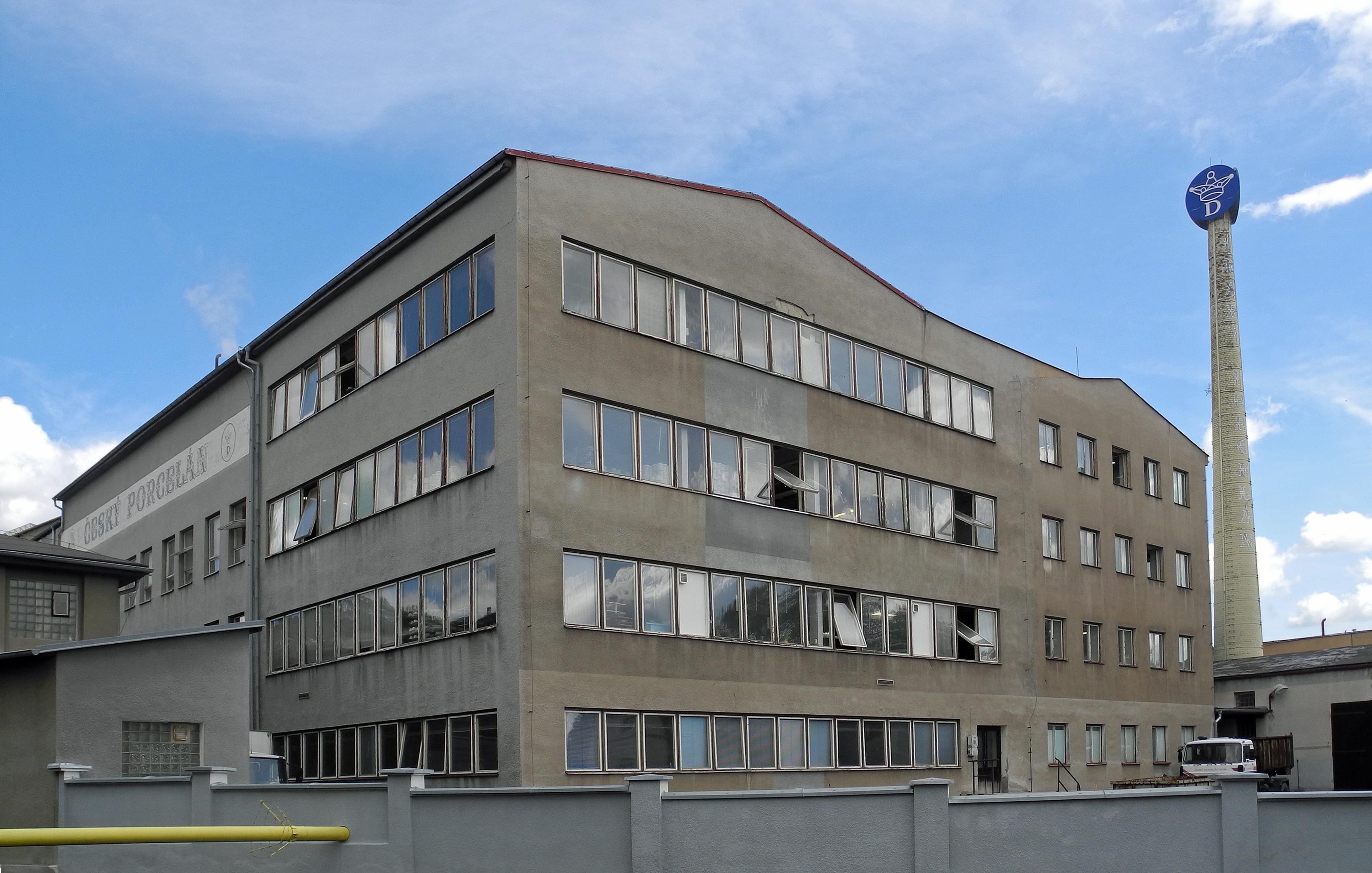 Porzellanfabrik Český porcelán, a.s. in Eichwald – Dubí u Teplic, Tovární 605/17